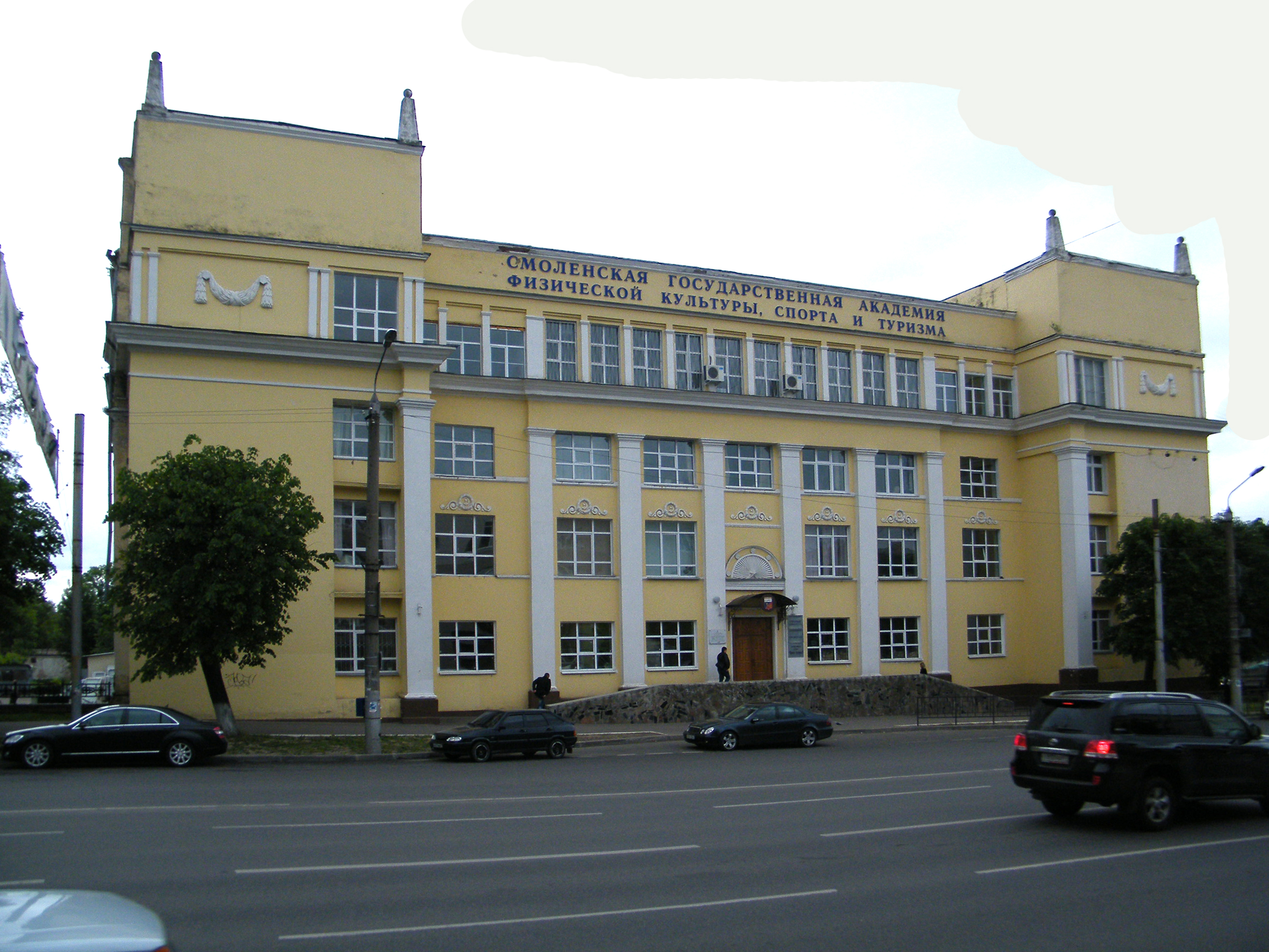 Академия физической культуры